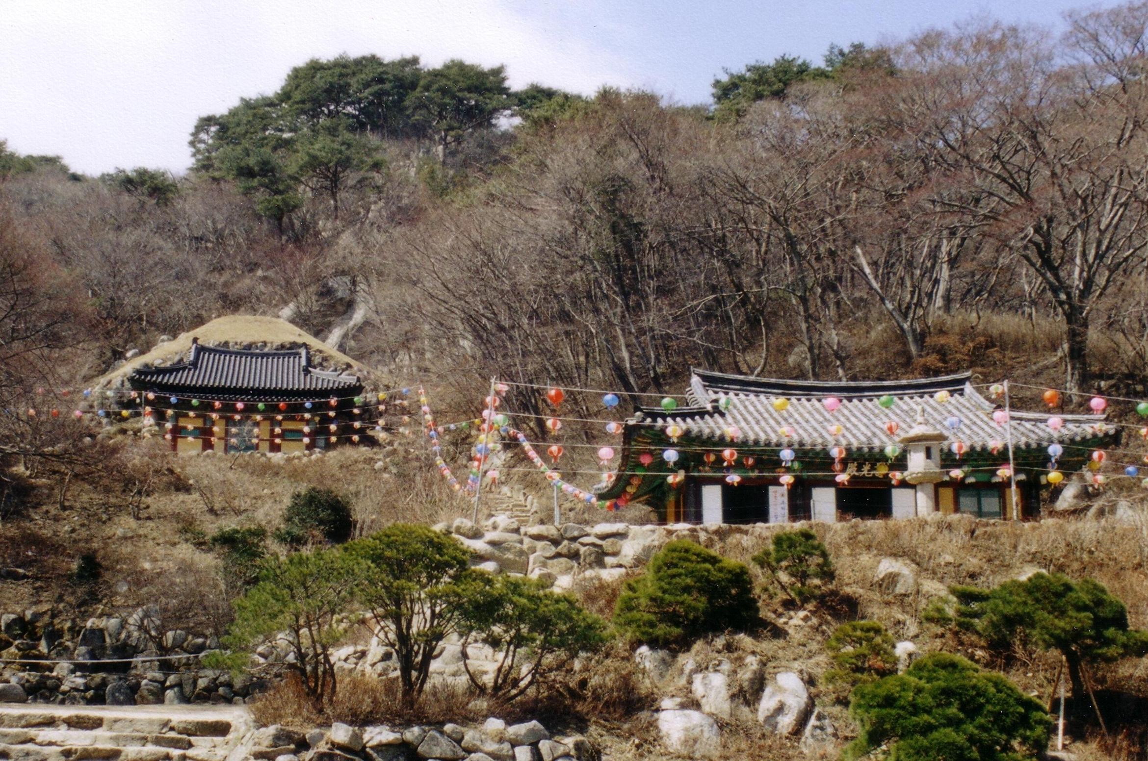 Seokguram Grotte aussen